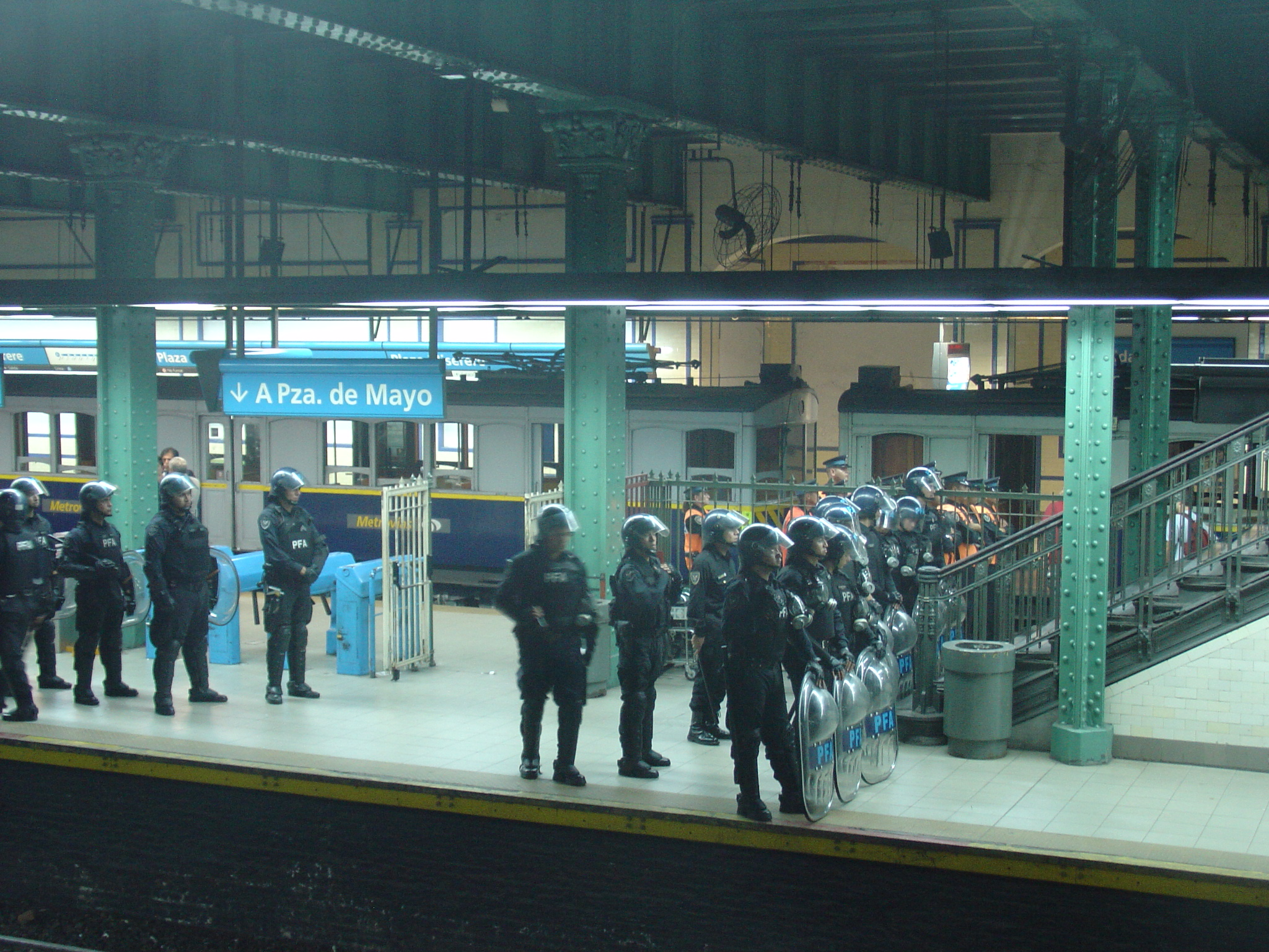 Policía Federal Argentina. Represión de una huelga de trabajadores del Subterráneo de Buenos Aires.